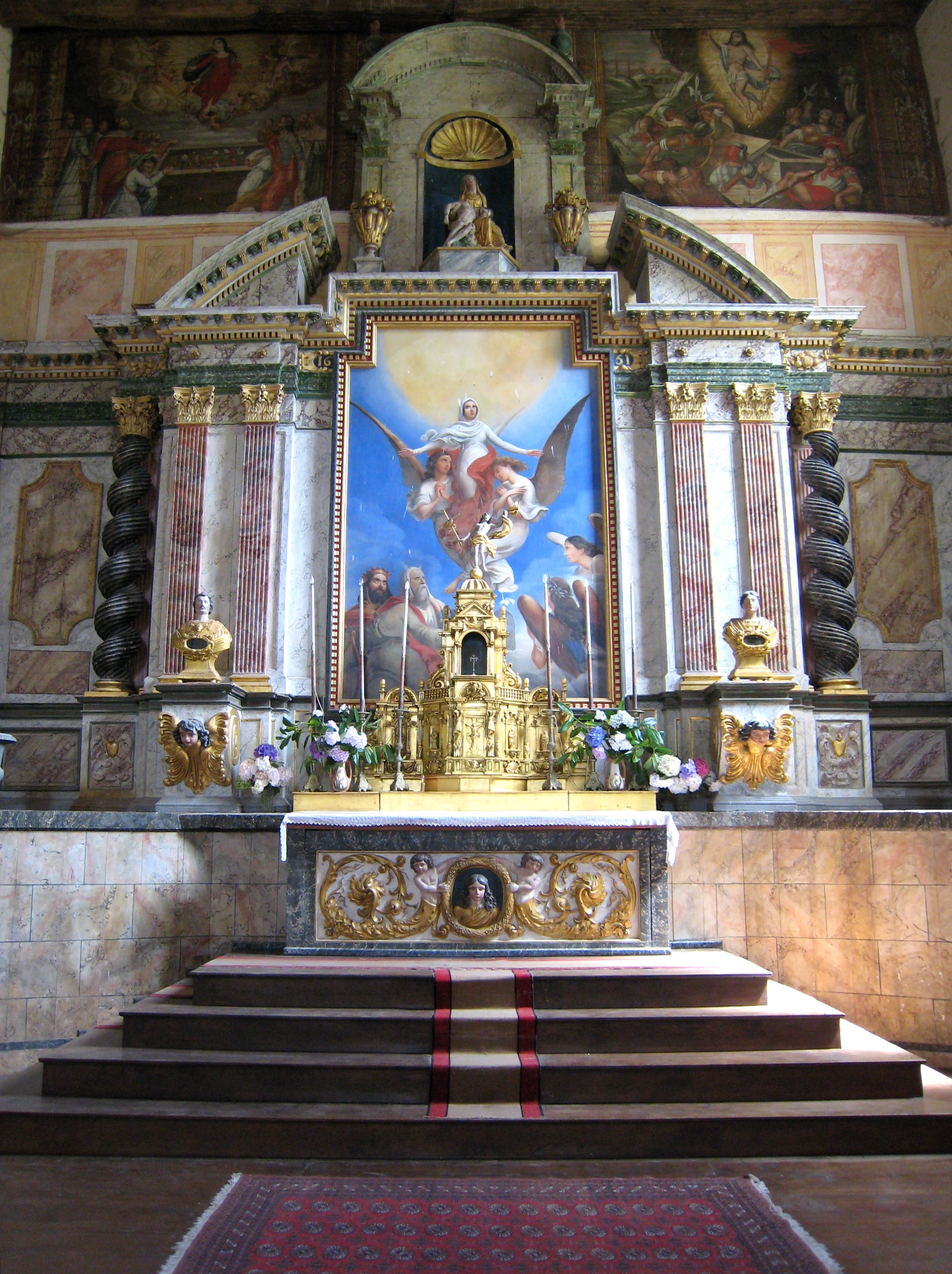 Mortemart (Haute-Vienne, France), église St Hilaire, ancienne église conventuelle des Augustins, ensemble du maître-autel du XVII° siècle comprenant un autel avec son tabernacle à ailes en bois doré, un retable portant un tableau d'autel, un groupe sculpté Vierge de Pitié et deux bustes-reliquaires, le tout surmonté de deux panneaux peints en bois représentant à gauche l'Assomption et à droite la Résurrection du Christ.